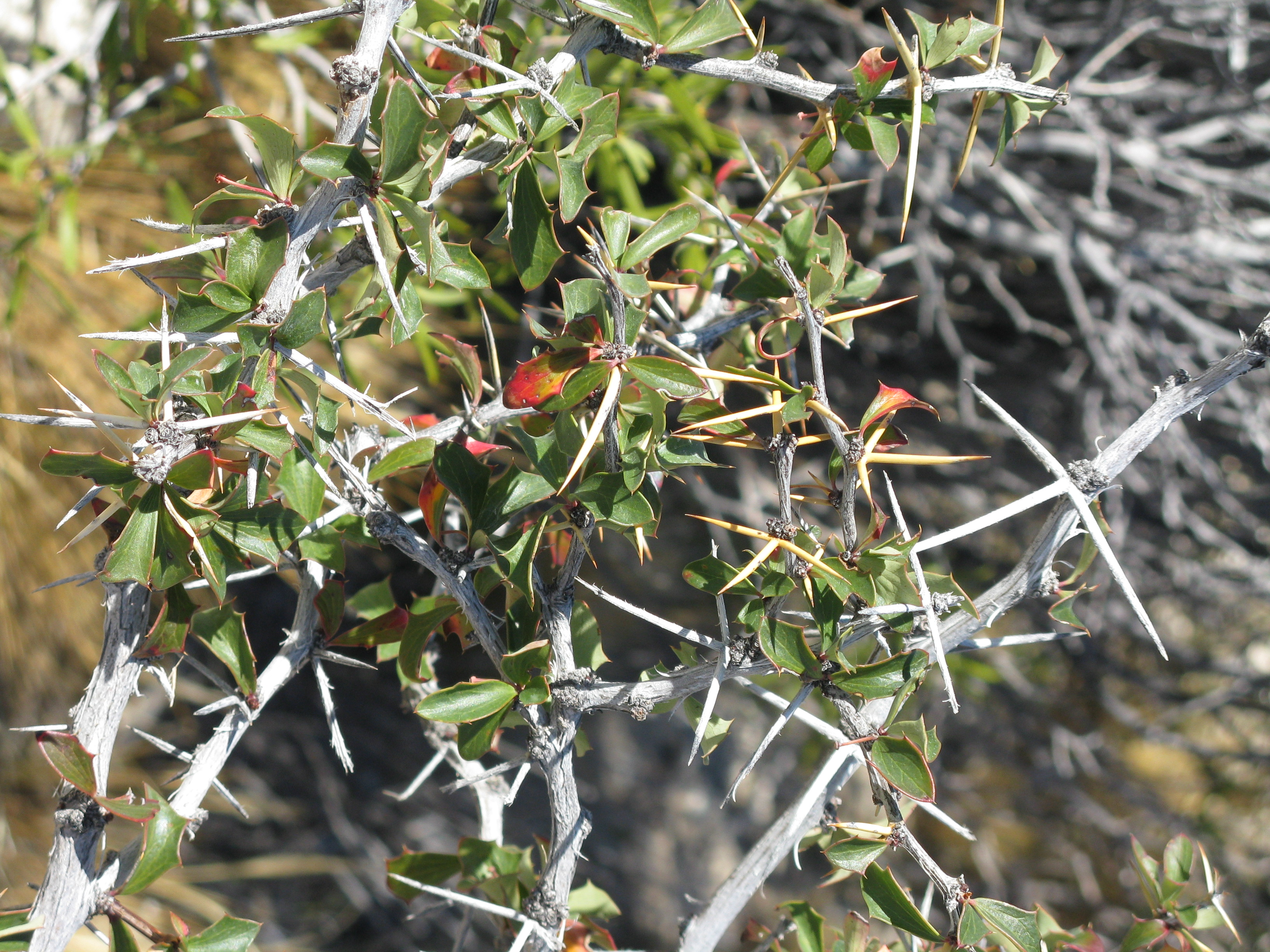 Planta de calafate (Berberis microphylla) - Patagonia Argentina